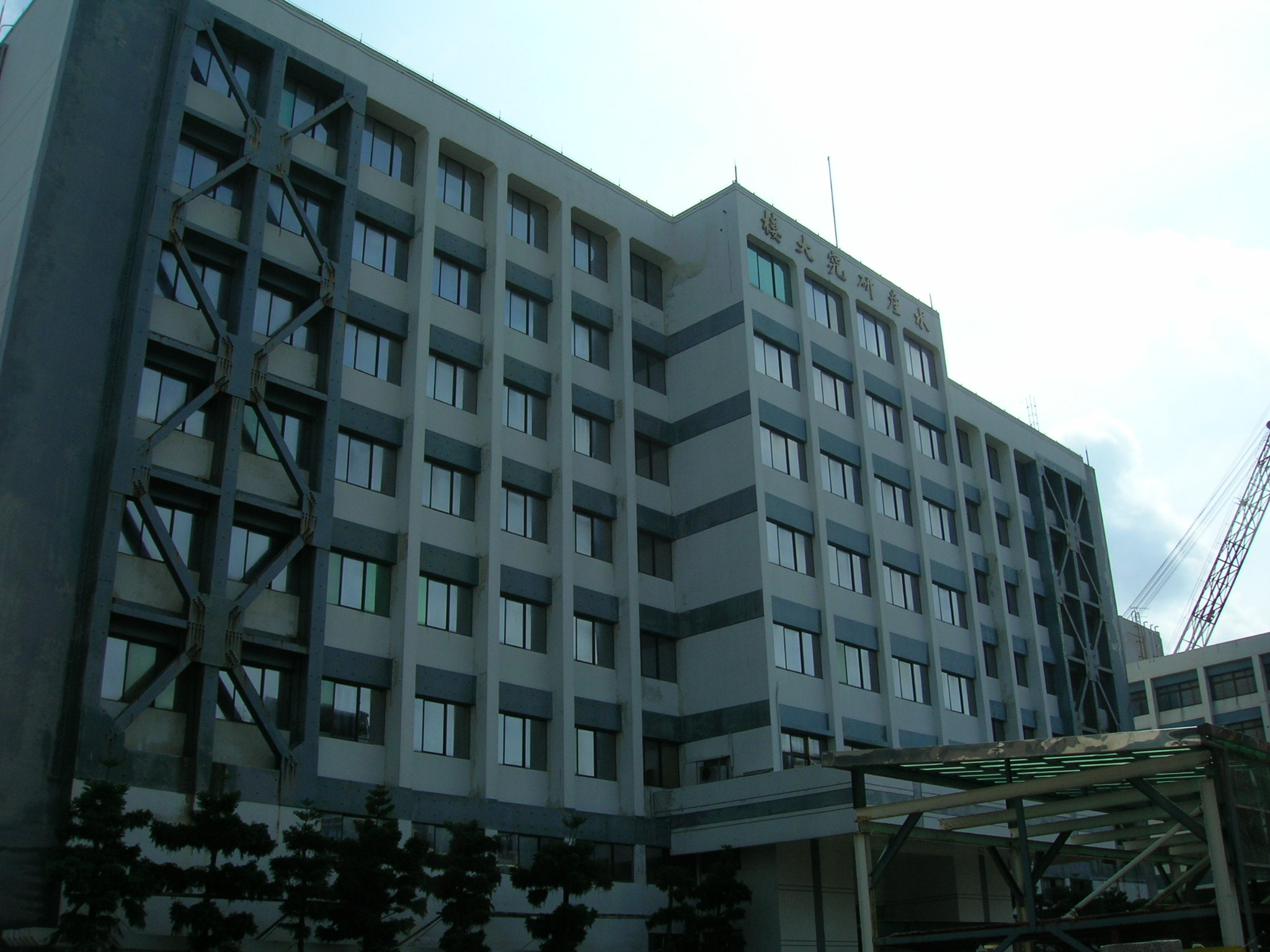 行政院農業委員會水產試驗所。位於基隆和平島。